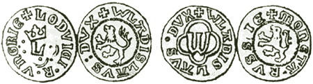 Władysław Opolczyk's duke coins